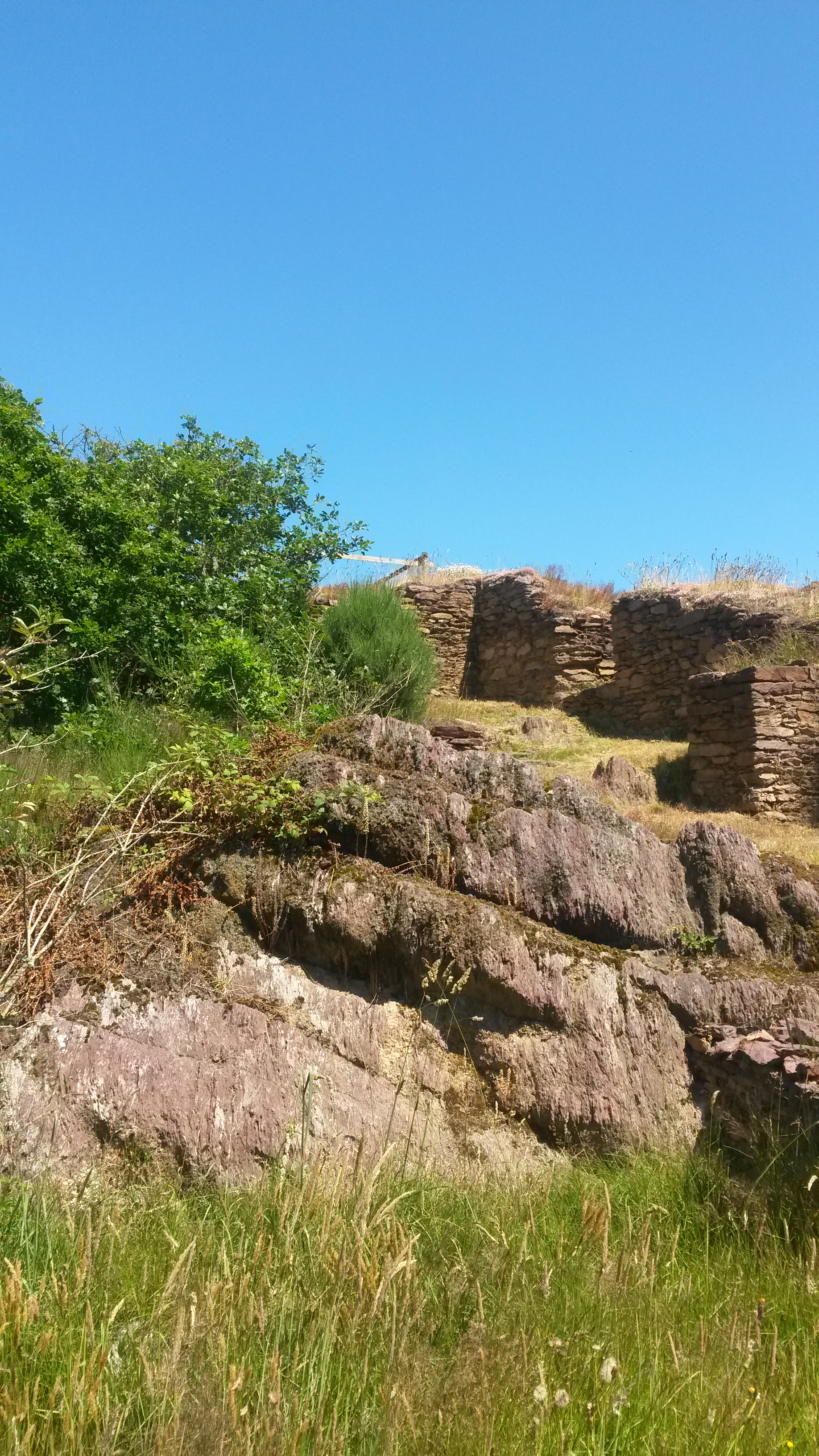 Enceinte du château de Boutavent